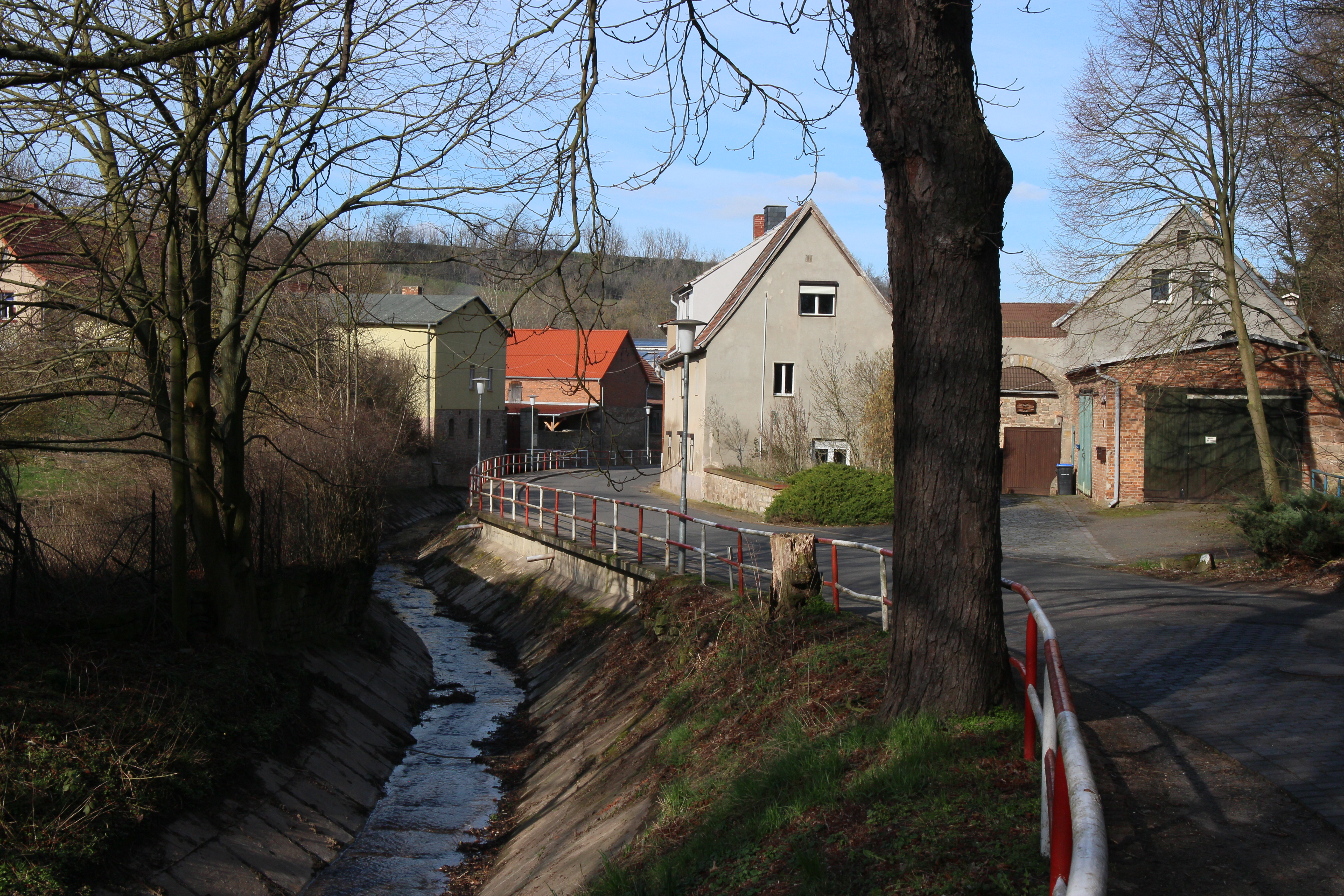 Der Fleischbach und Häuser in Bösenburg